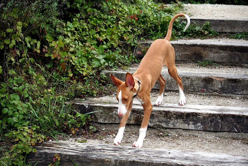 Chienne Pod'I de 4 mois descendant des escaliers